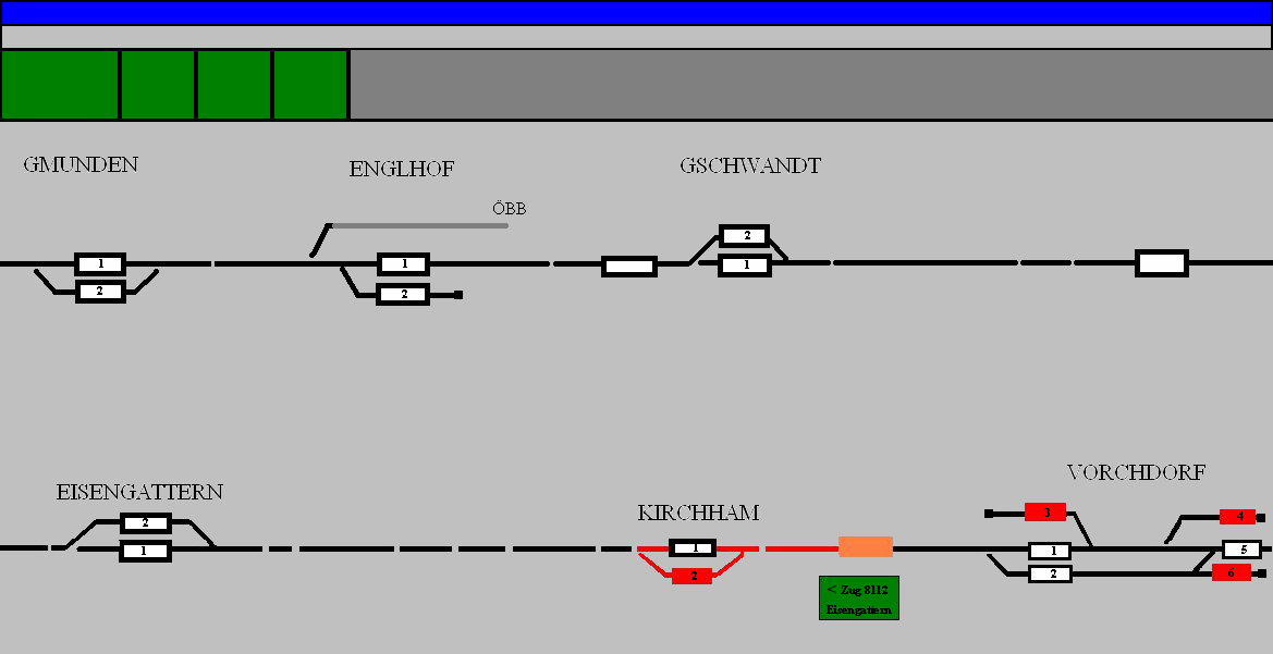 Ansicht der Zugleitsystemsoftware